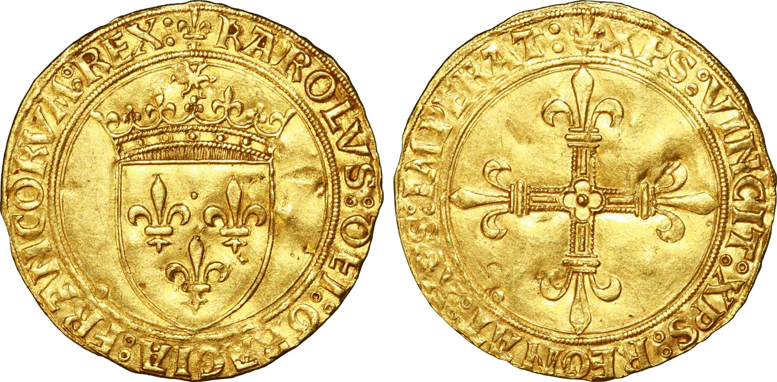 Nom de l'atelier/ville : Paris Métal : or Diamètre : 26,5mm Axe des coins : 6h. Poids : 3,47g. Titulature avers : (lis) KAROLVS° DEI° GRACIA° FRAnCORVm° REX (Mm), (ponctuation par deux annelets superposés). Description avers : Écu de France couronné sous un soleil. Traduction avers : (Charles, par la grâce de Dieu, roi des Francs). Titulature revers : (lis) XPS° VInCIT° XPS° REGnAT° XPS° ImPERAT (Mm), (ponctuation par deux annelets superposés). Description revers : Croix fleurdelisée avec quadrilobe en cœur. Traduction revers : (Le Christ règne, le Christ vainc, le Christ commande). Fabrication: 8 July 1494